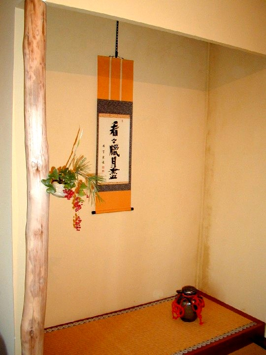 Tokonoma